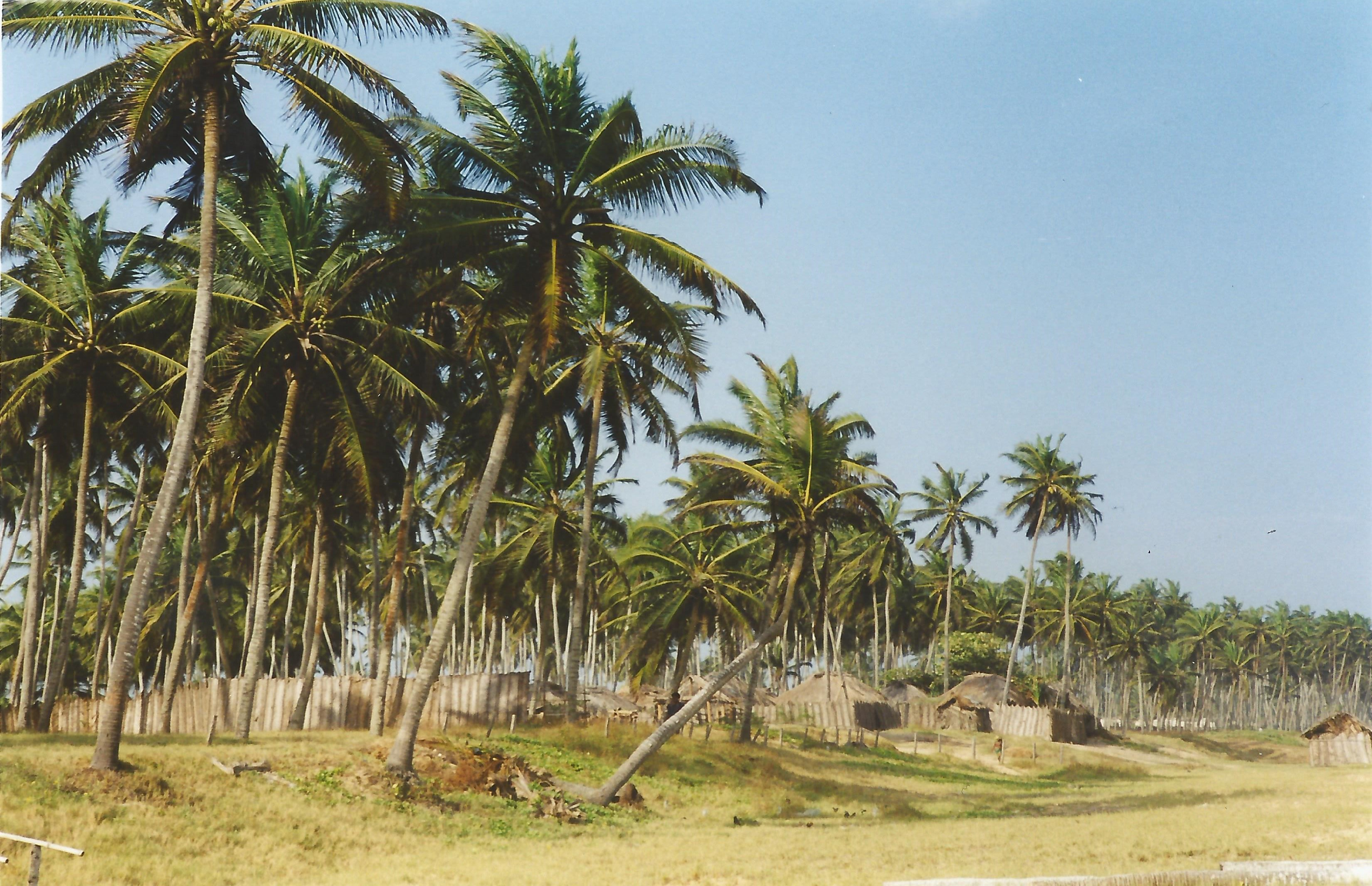 Plage à Grand-Popo (Bénin), 17 août 1999